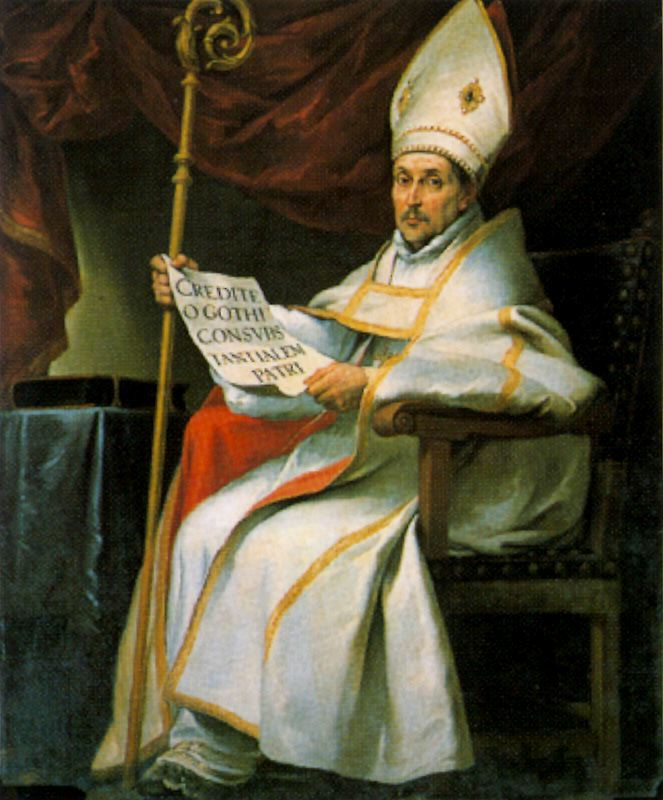 San Leandro (c. 534-596), que fue arzobispo de Sevilla al igual que su hermano menor, San Isidoro, aparece portando en su mano derecha un pliego de papel alusivo a su lucha contra la herejía arriana. Y según la tradición el rostro del santo está inspirado en el del licenciado Alonso de Herrera.